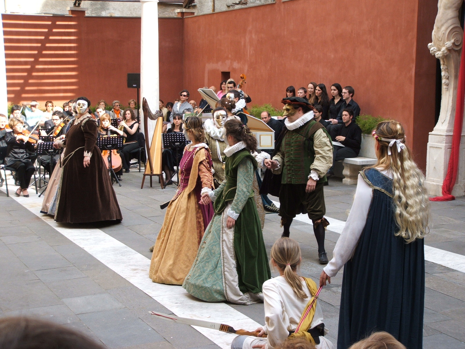 Genova, Palazzo Rosso - Rappresentazione de "Il ballo delle ingrate" - Madrigale in genere rappresentativo di Claudio Monteverde, testo di Ottavio Rinuccini.